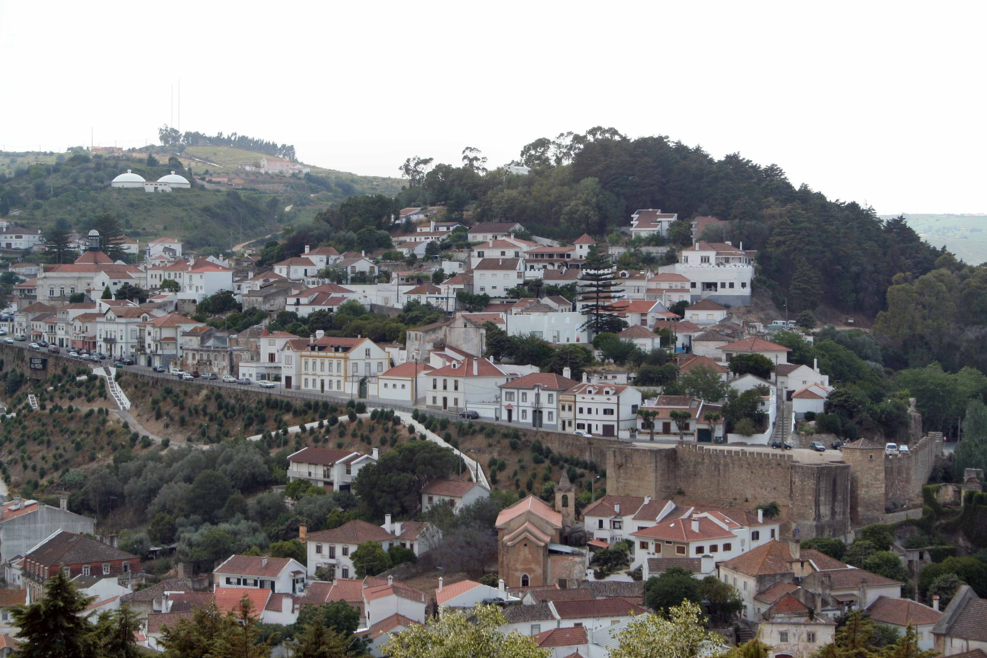 Description